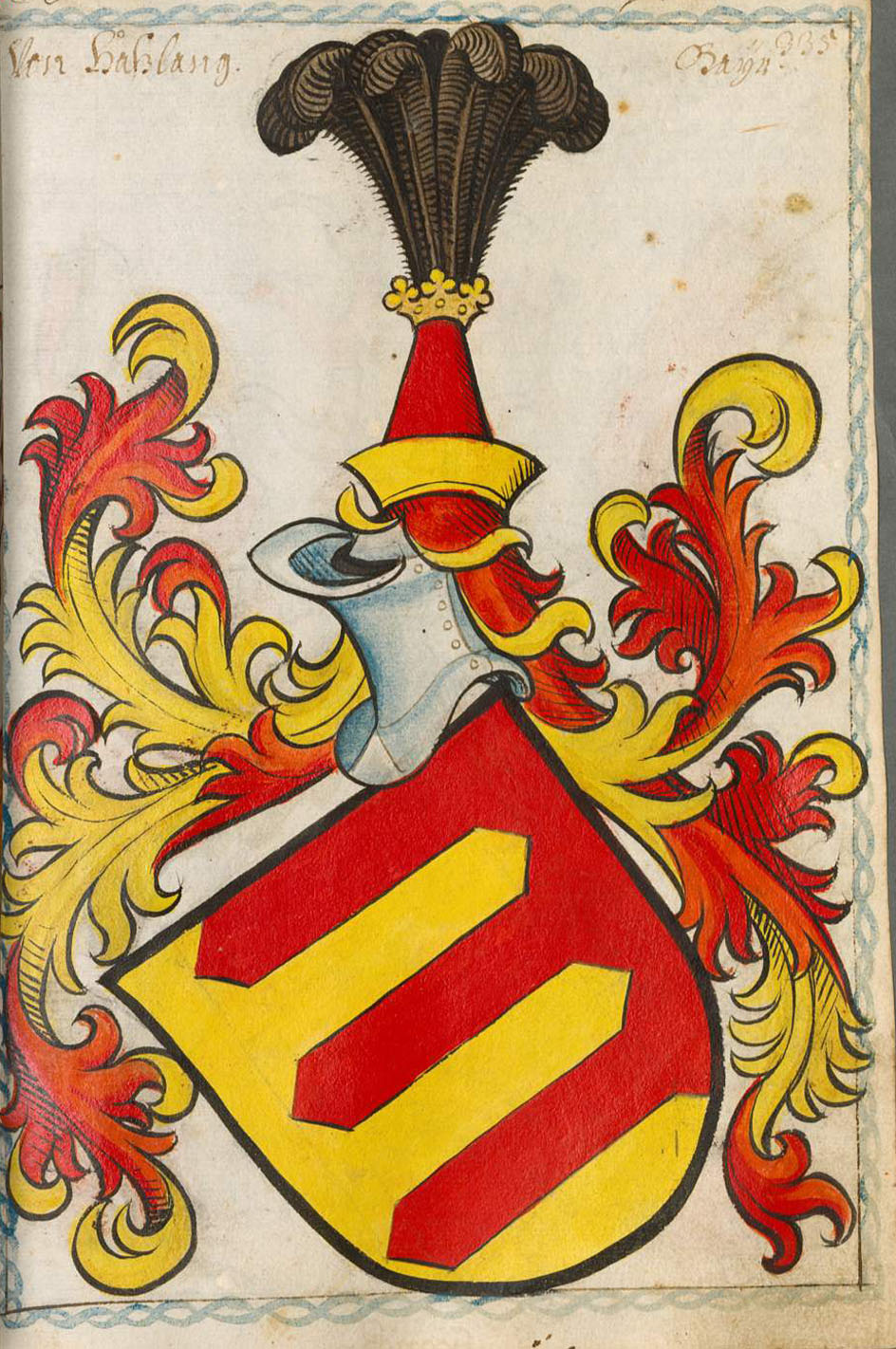 Scheibler'sches Wappenbuch , älterer Teil; Seite 335 Von Haßlang Bayern